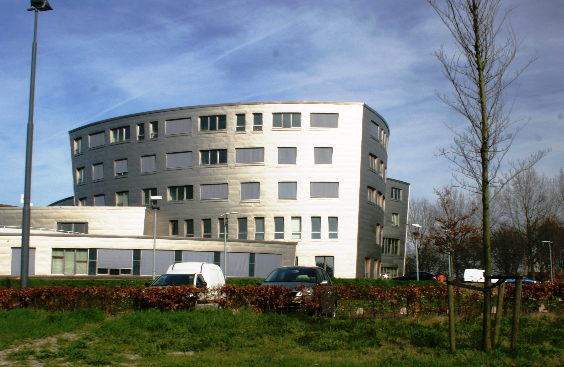 Gemengenhaus vu Schouwen-Duveland .